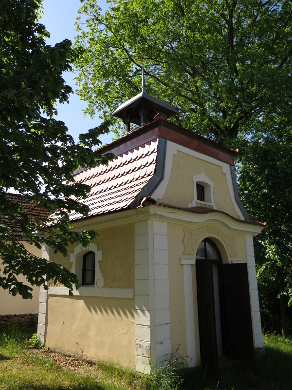 Návesní kaple, náves, Malenín.